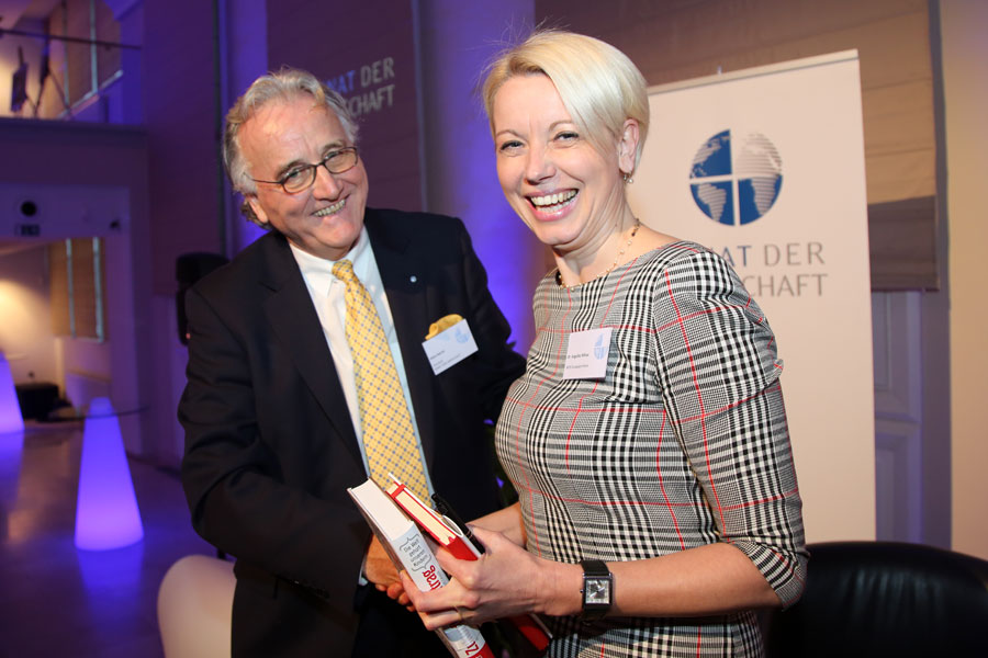 Hans Harrer, Angelika Mlinar-4321